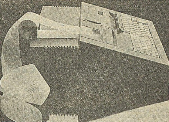 P 6040 Olivetti